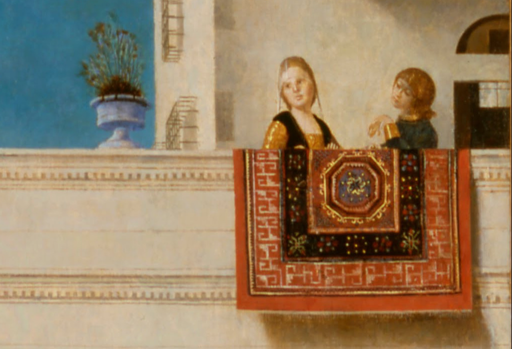 détail des personnages de droite sur le portique